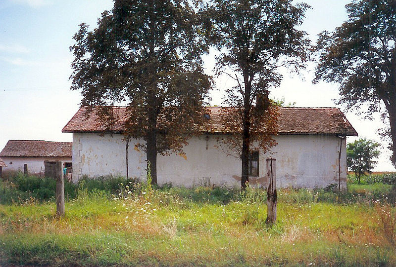 Az egykori árpádhalmi vasútállomás